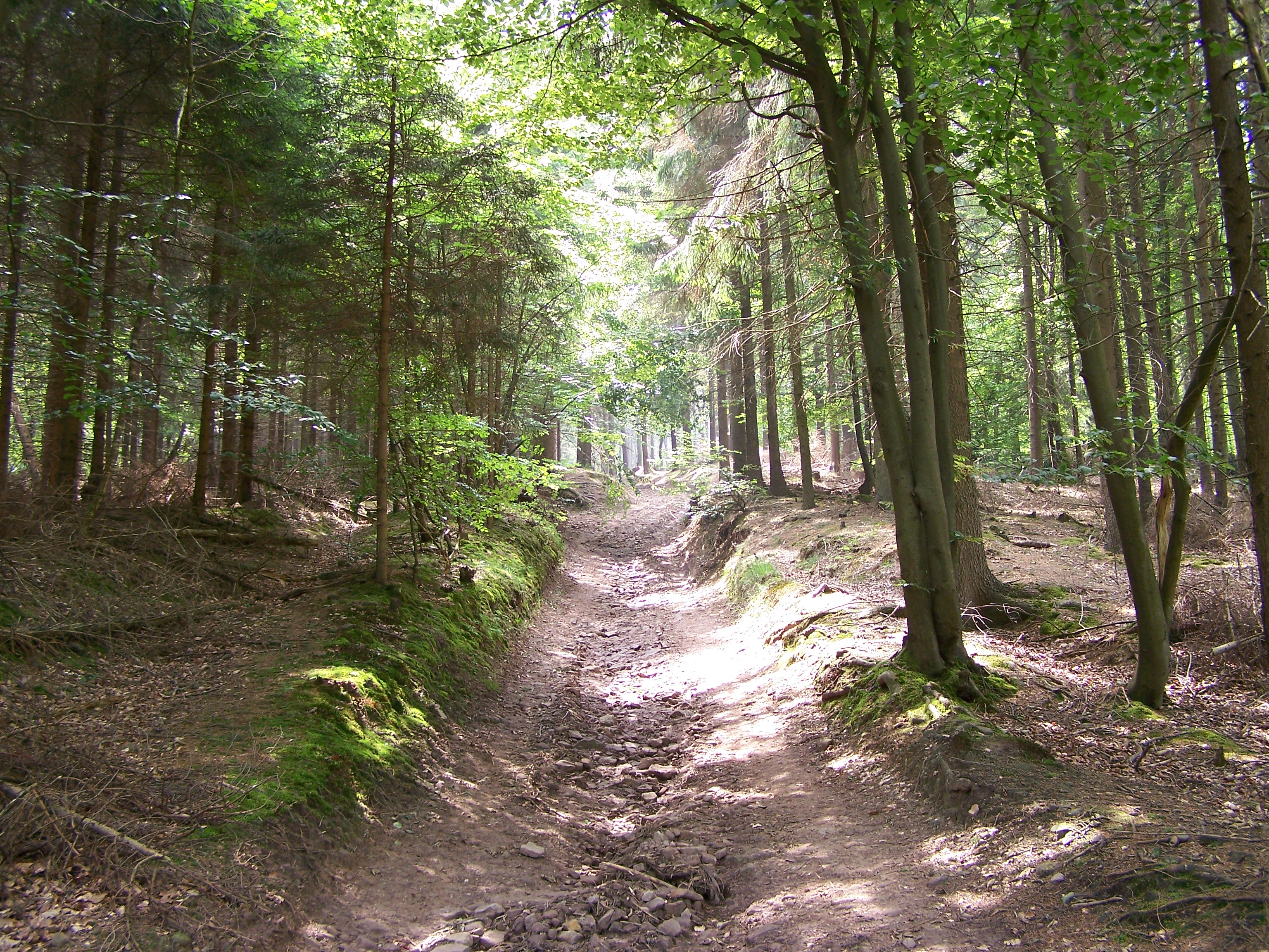 Ausgewaschener Weg zur Spitze des Hüggels.